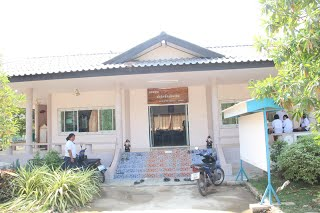 หอสมุดสำนึกรักบ้านเกิด โรงเรียนห้วยกรดวิทยา